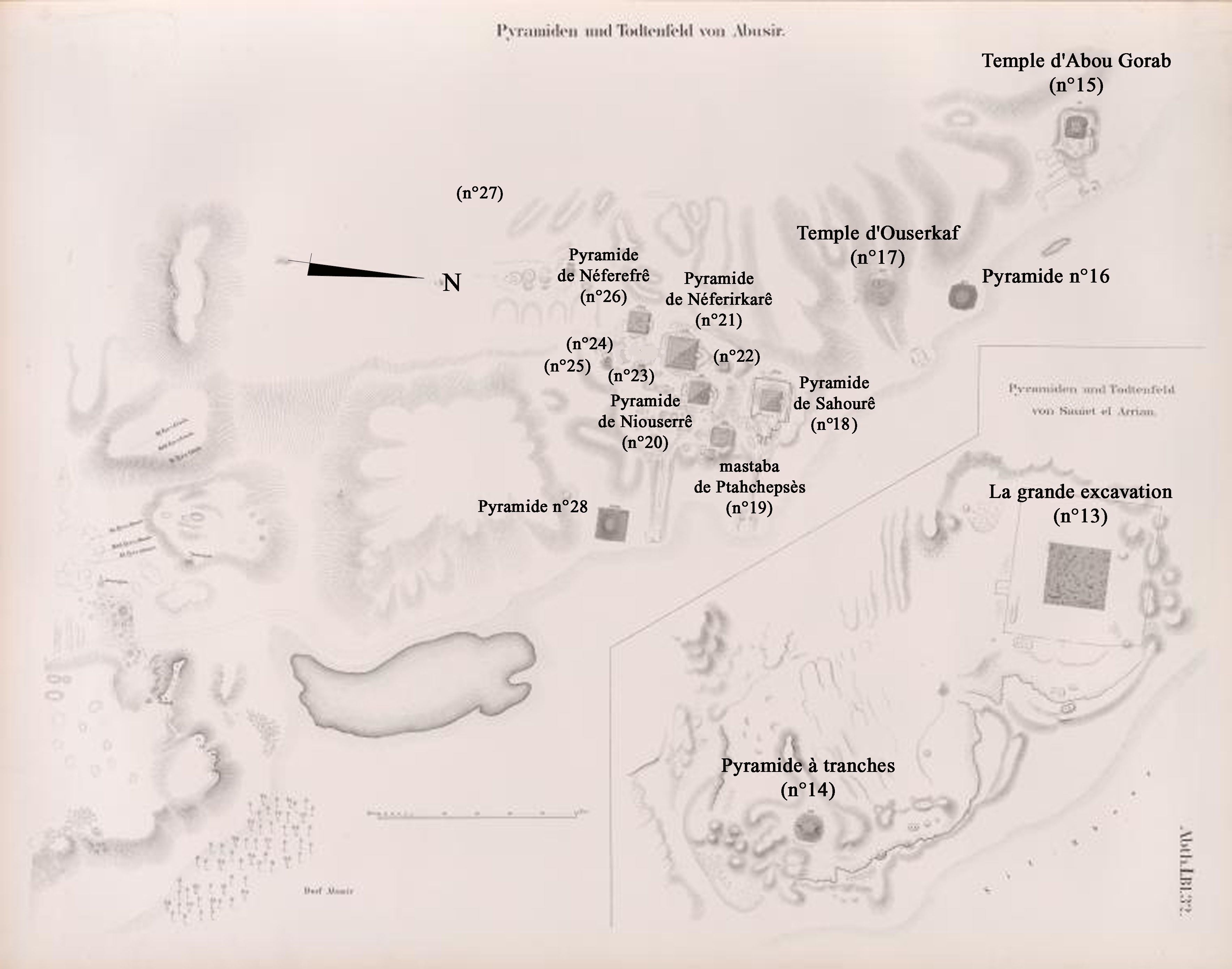 Carte d'Abousir, d'Abou Gorab et de Zaouiet el aryan (Karl Richard Lepsius)